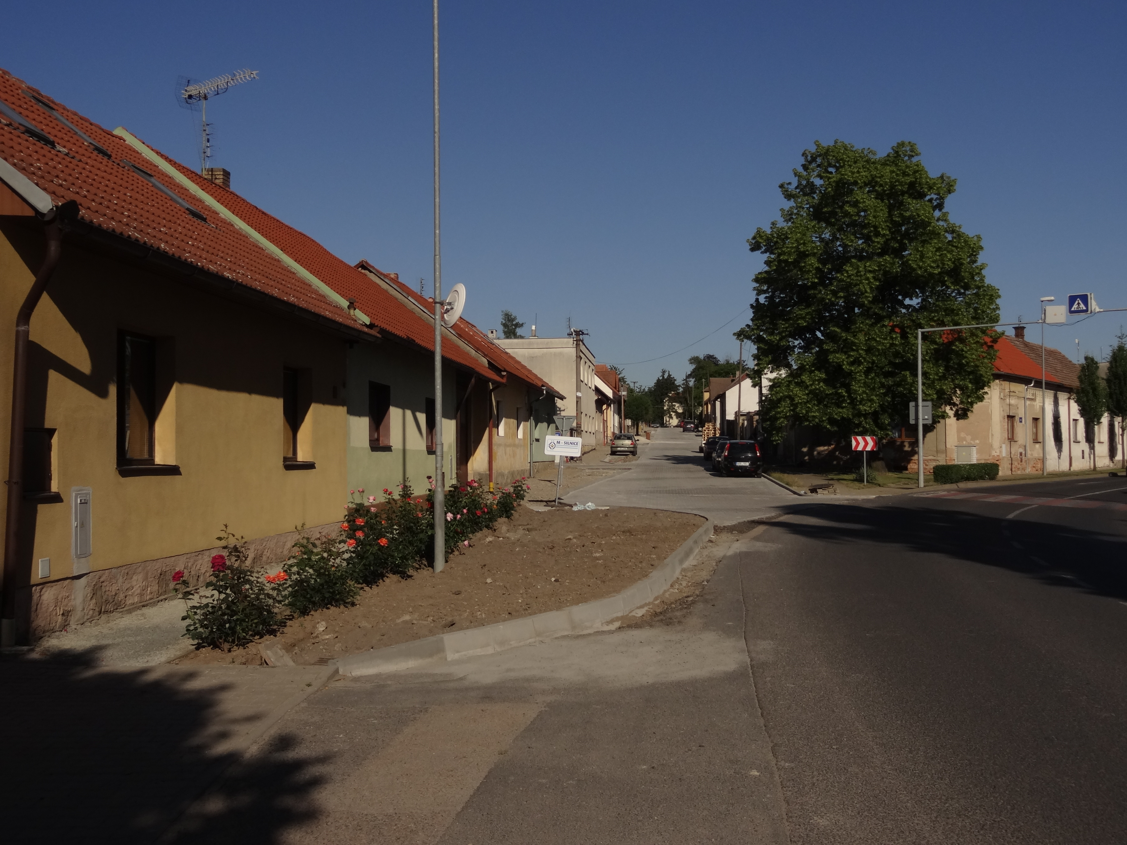 ulice Na hradisku v Lázních Toušni na místě slovanského hradiště